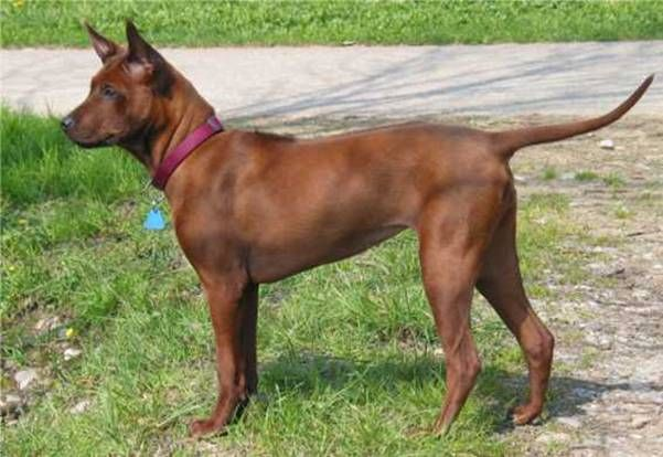 Thai-Ridgeback Taptim Siam Paitoon NEO